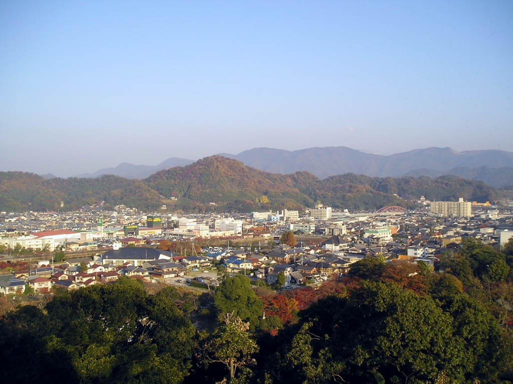 彦根城（天守付近）より佐和山城跡を望む。（滋賀県ja:彦根市） Photo by Si-take. Nov.2007